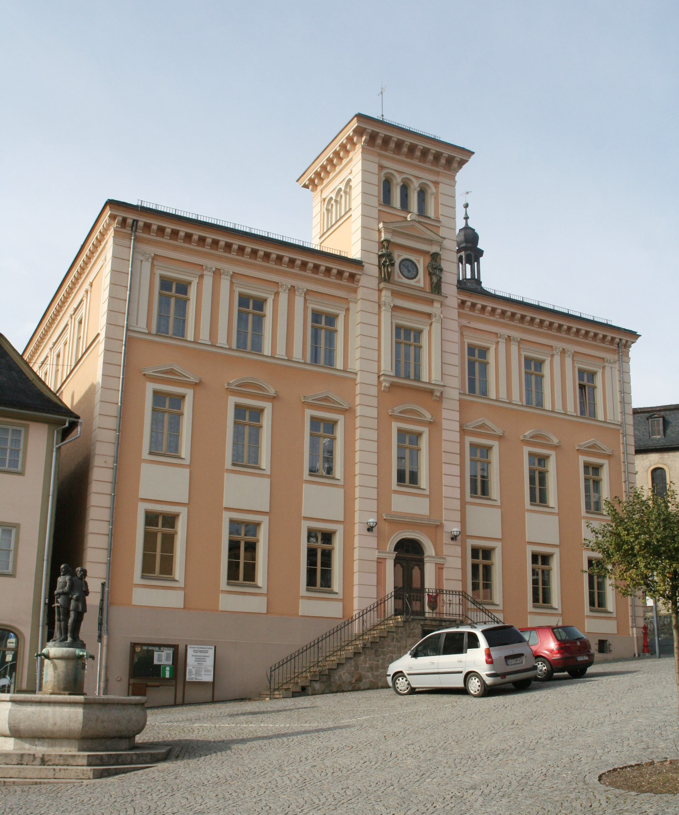 Rathaus Gräfenthal in Südthüringen